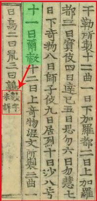 경주시 안강읍 옥산리 옥산서원에 소장한 보물 525호 정덕본 삼국사기에 이사(爾赦)의 사(赦)는 미상이므로 일본서기에 사이기국의 개입 불가